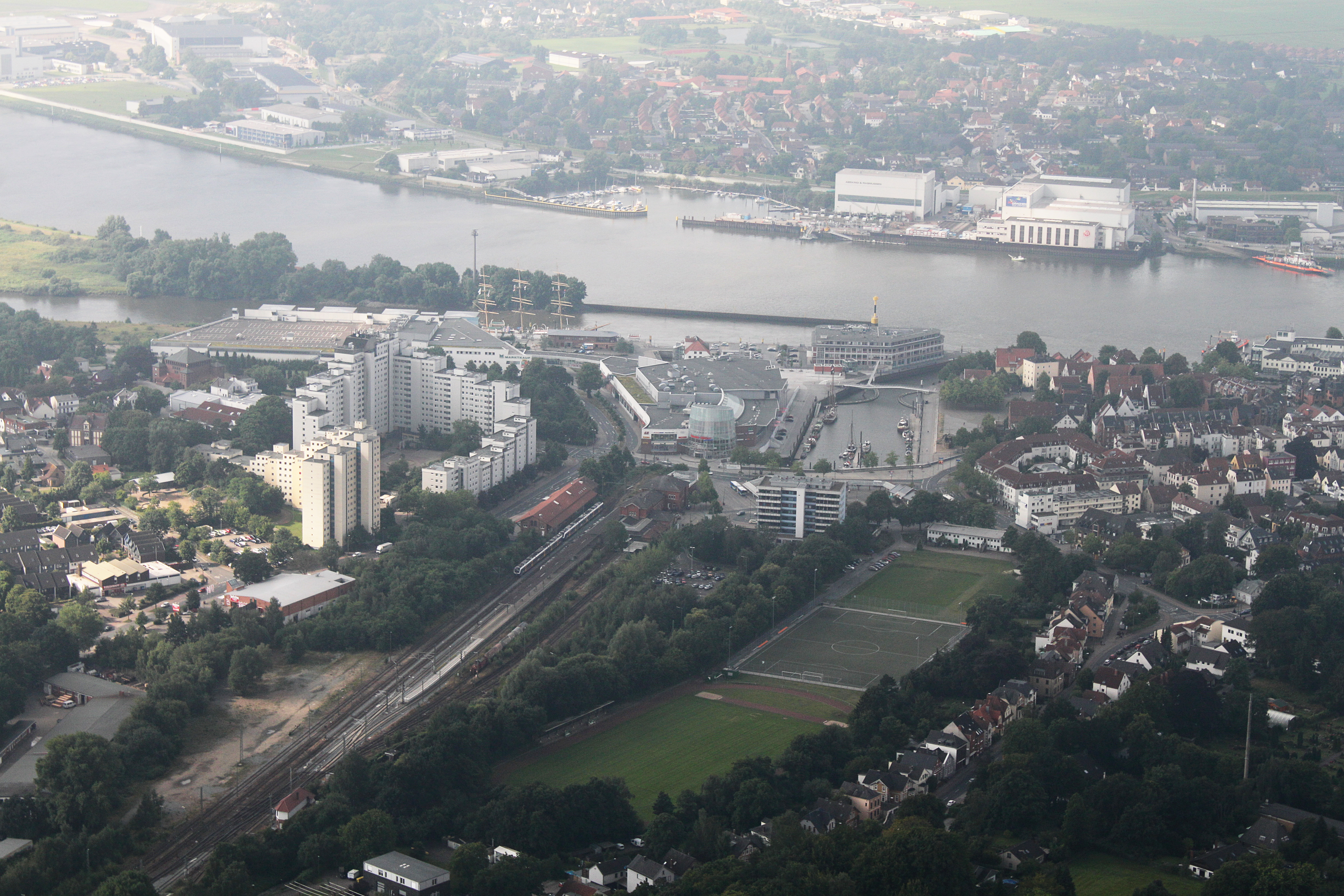 Fotoflug Bremen; Flughöhe 500 m; Vegesack, Haven Höövt, Schulschiff Deutschland, Abeking&Rasmussen